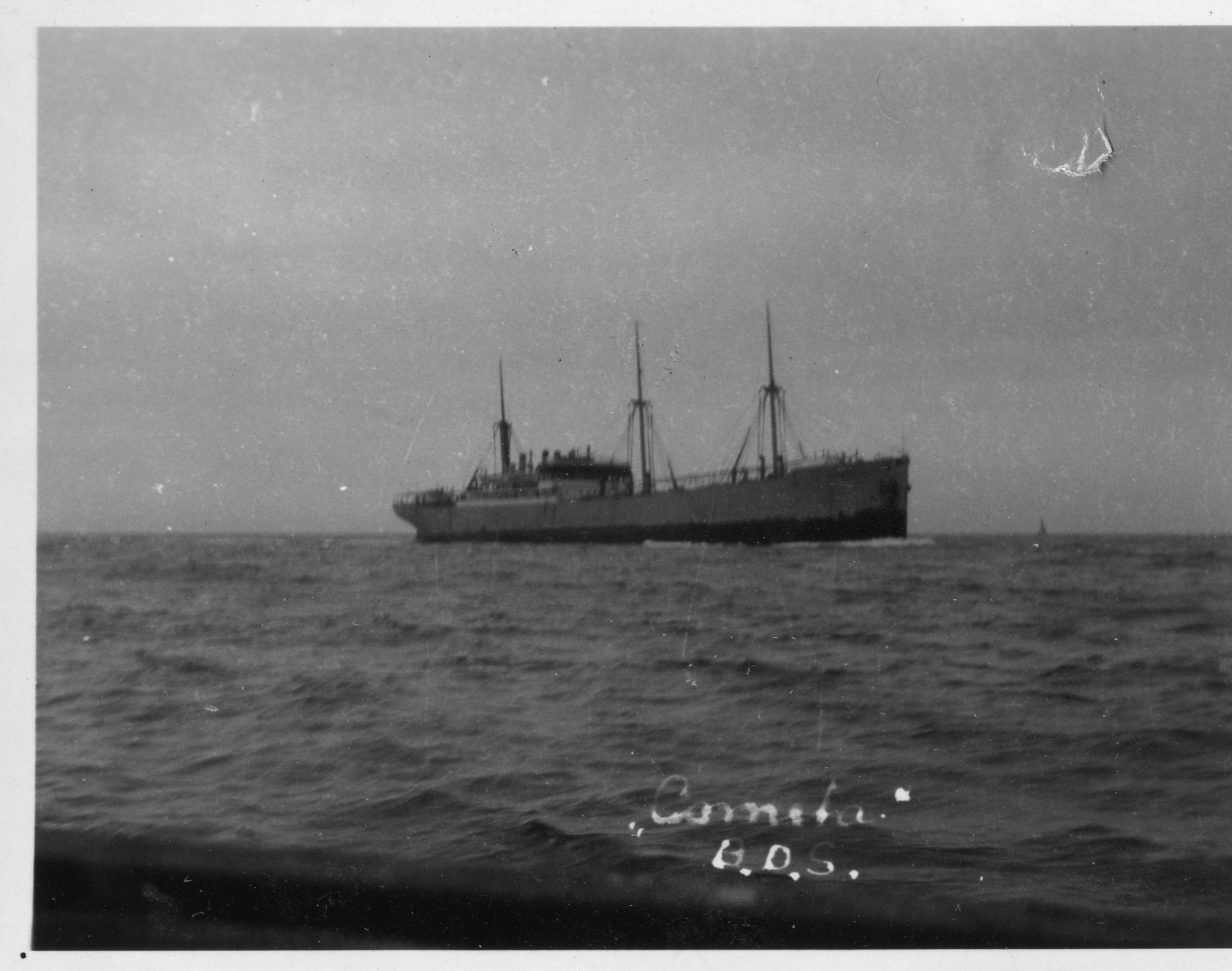 Bildet er hentet fra Arkivverket. B.D.S. 6640 T.DW. Krigsforlist ved Orkenøyene 26/03-1940 Arkivinstitusjon : Statsarkivet i Kongsberg Arkivnavn : Telemark politikammer Sted : , , , Emneord: Skip, Hav, Båt Avbildet